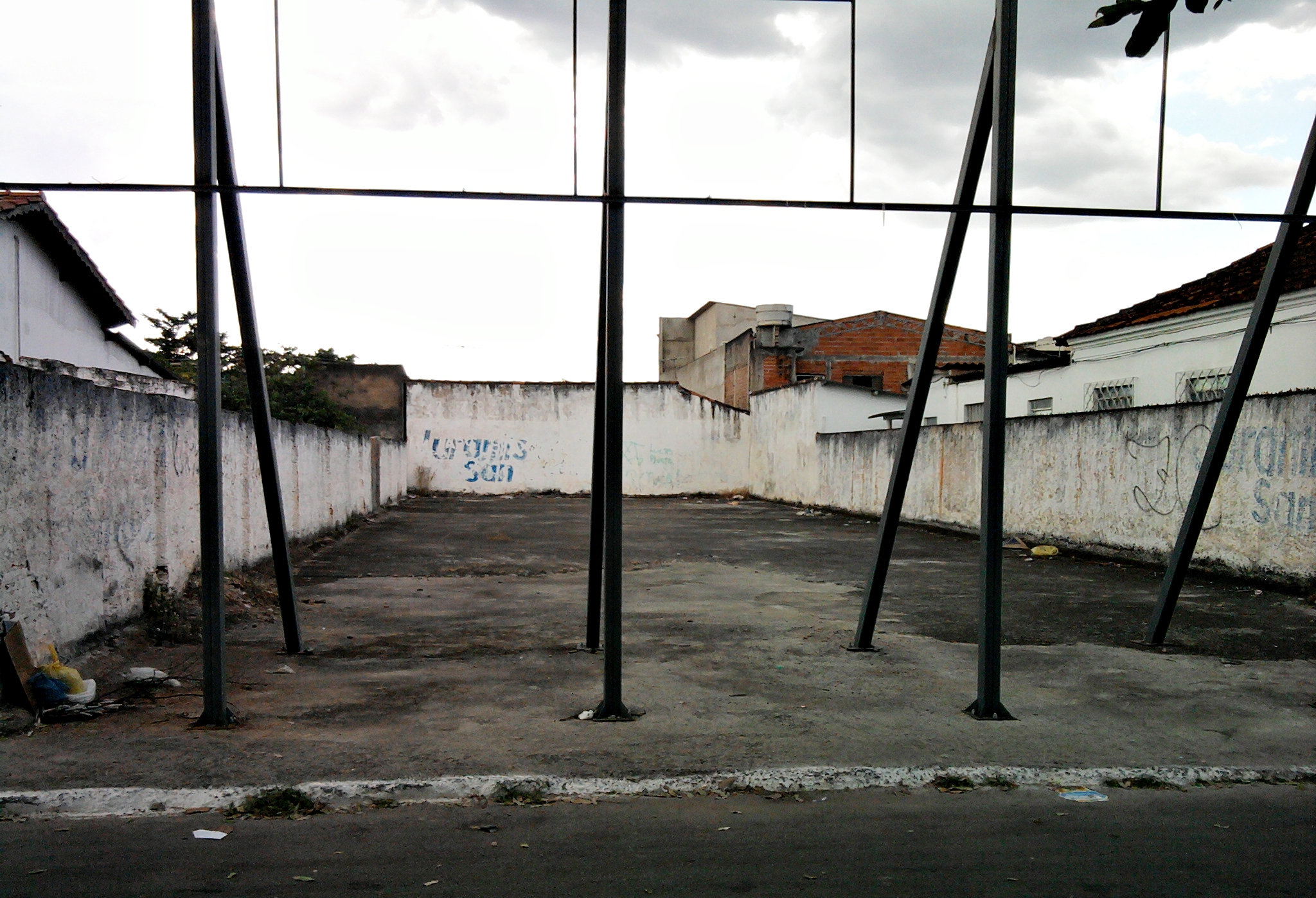 Rua 57 - Goiânia - Goiás - Brasil